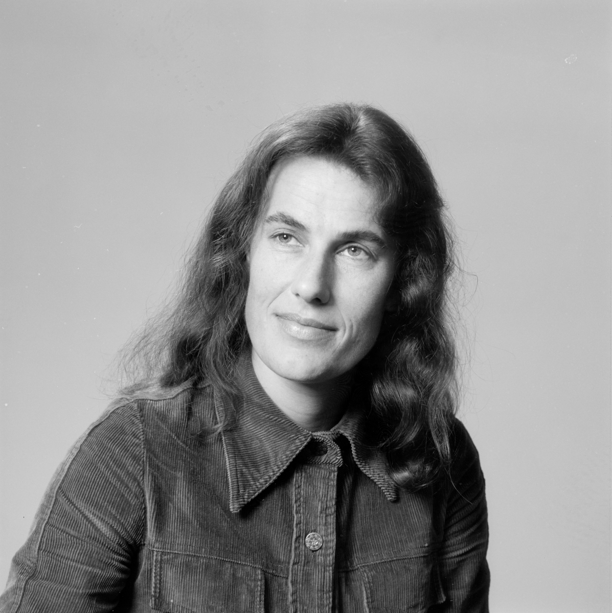 Liv Køltzow, portrett, kvinne, forfatter, brystbilde.